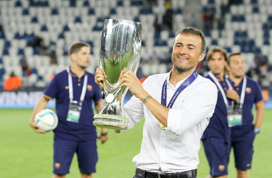 Нагородження переможців матчу за Суперкубок УЄФА 2015 року у Тбілісі. Грузія